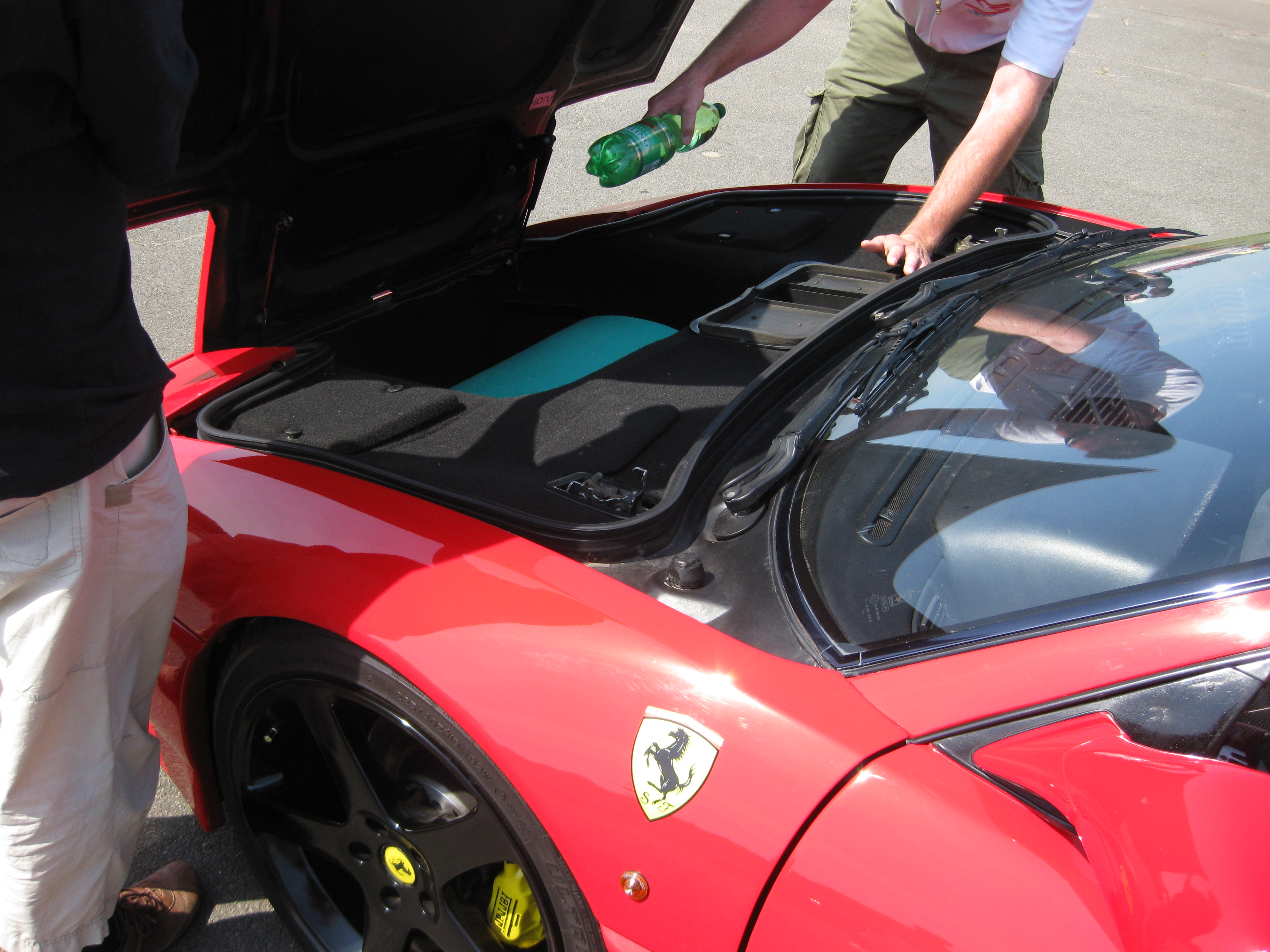 Ferrari 348tb Kofferaum